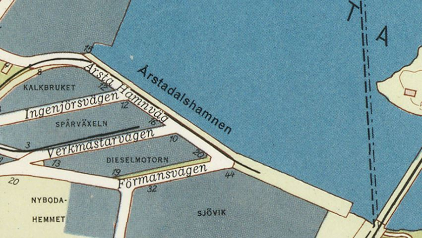 Del av Stockholmskarta visande Årstadelshamnen